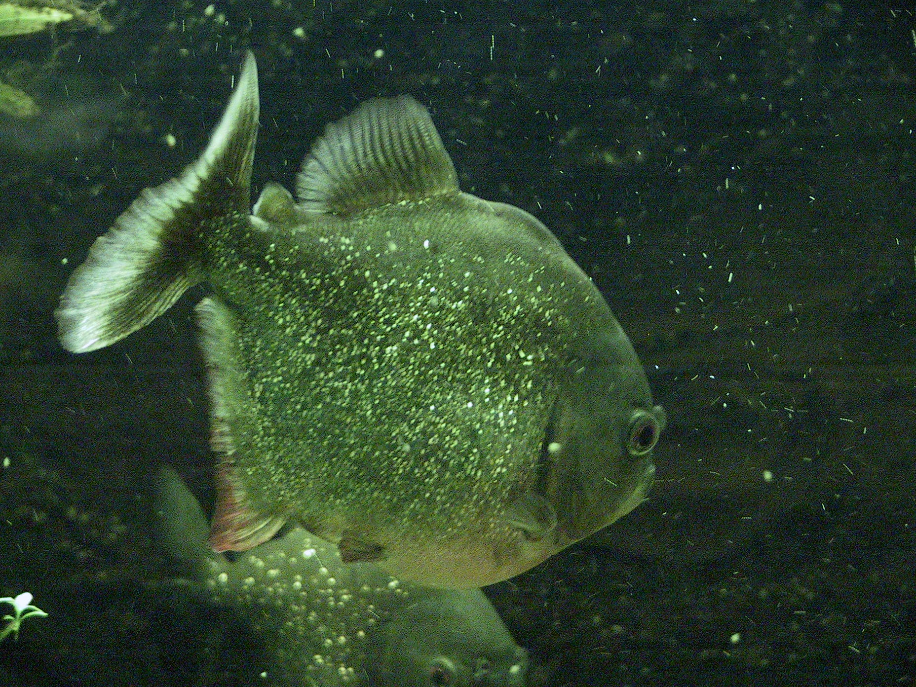 L'acquario - Siracusa - Sicilia